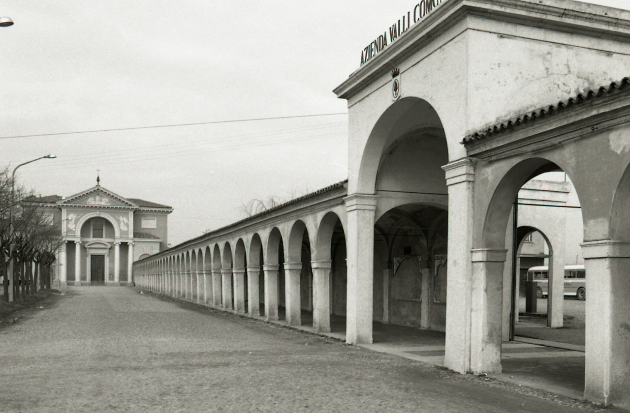 Comacchio. Centro storico. Vedute urbane con palazzi e particolari elementi architettonici; l'antico rione del Carmine? Regione. Servizio fotografico : Comacchio, 1975 / Paolo Monti. - Strisce: 7, Fotogrammi complessivi: 37 : Negativo b/n, gelatina bromuro d'argento/ pellicola ; 35 mm. - ((Sul portanegativi: N[I]K[MA]T FP4. - All'interno del portanegativi: sulla faccia interna una linea orizzontale a pennarello nero separa i fotogrammi nn. 32 e 33 come se fossero due serie distinte; al momento non è possibile individuare due soggetti differenti e quindi due serie distinte. - . - Occasione: Documentazione del territorio della provincia di Ferrara e centri storici minori. - Fonte: Agenda di Paolo Monti: Leica 1501-3000 Controllo numerazione (1950-1978), presso Archivio Paolo Monti. - Fonte: Fattura di Paolo Monti: IV. Commesse/ Fattura n. 11 (1975/04/29), presso Archivio Paolo Monti. - Fonte: Monografia: Territorio ferrarese: un programma di governo della Regione e delle autonomie locali, catalogo della mostra, Ferrara 1975, a cura di Roberto Fregna, Modena, Soc. Immobiliare & Poligrafica emiliana (1975)